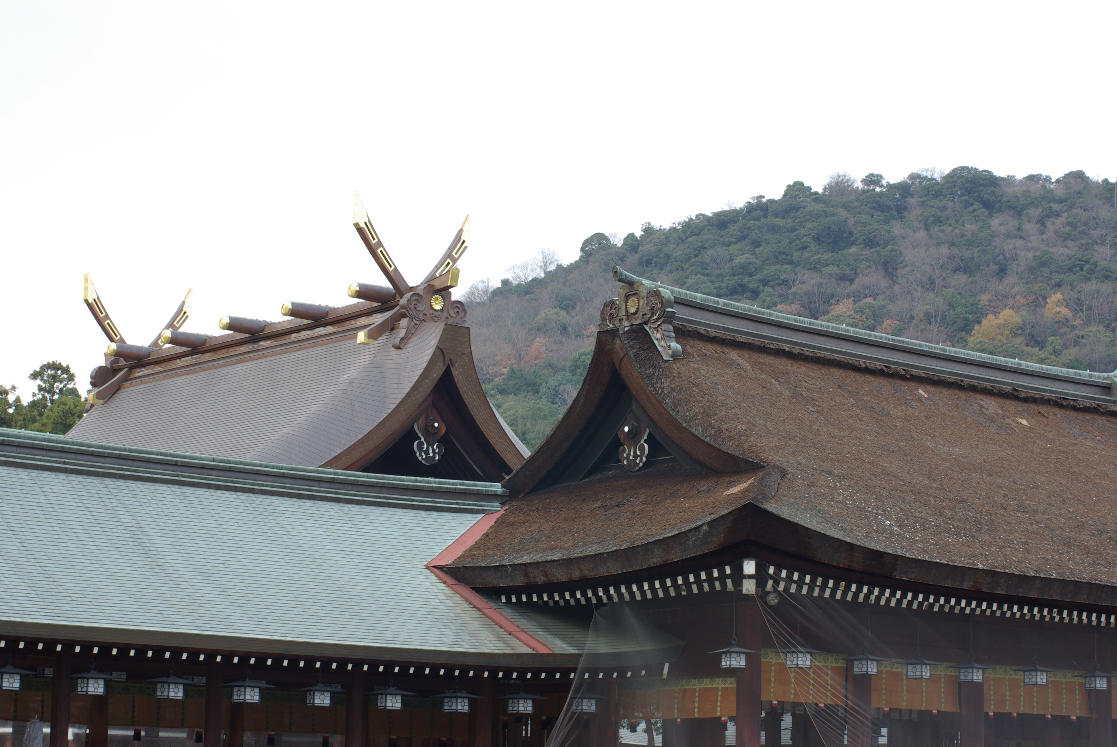 橿原神宮と畝傍山